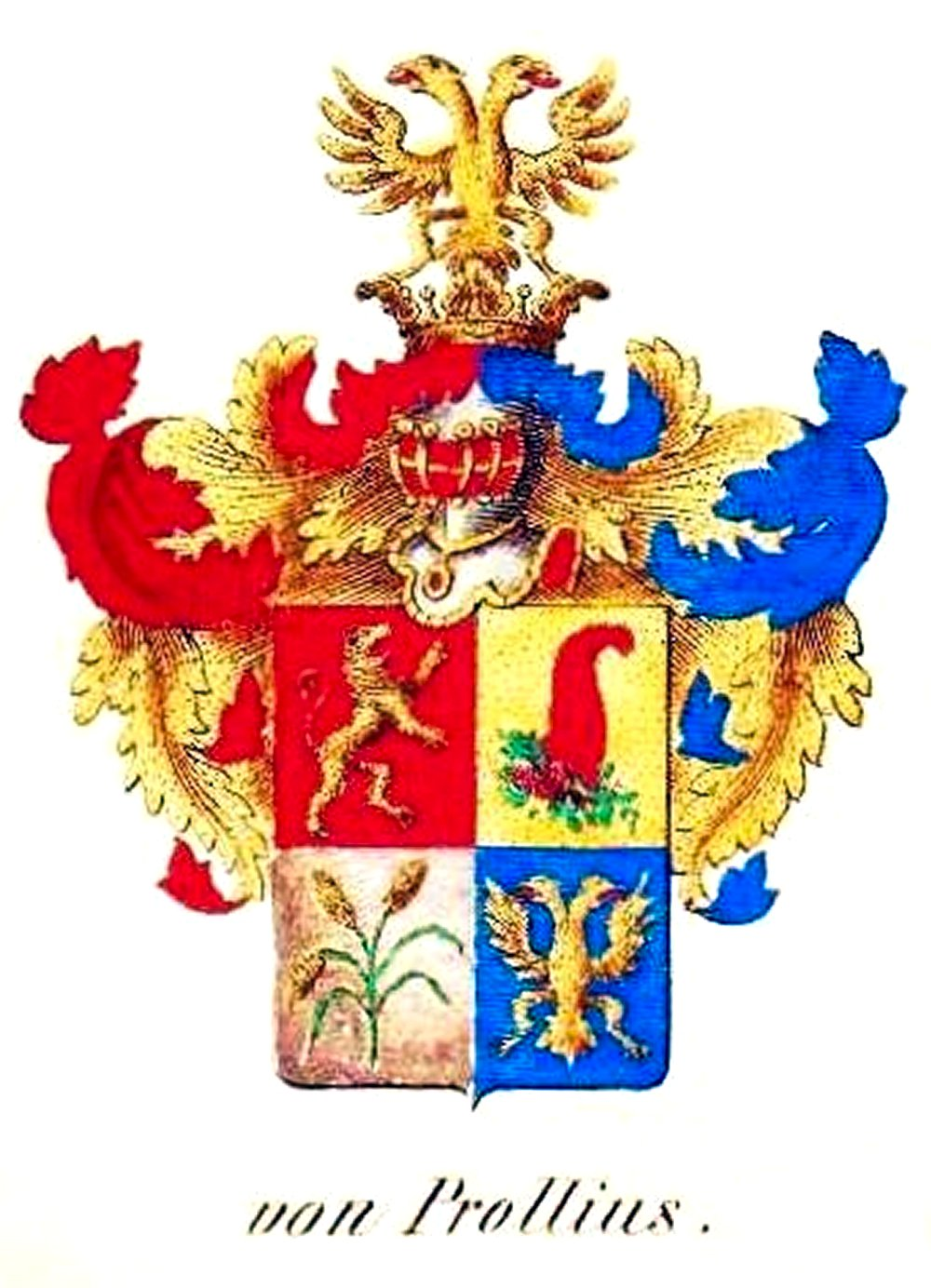 Wappen der mecklenburgischen Familie von Prollius (Reichsadel 1795).